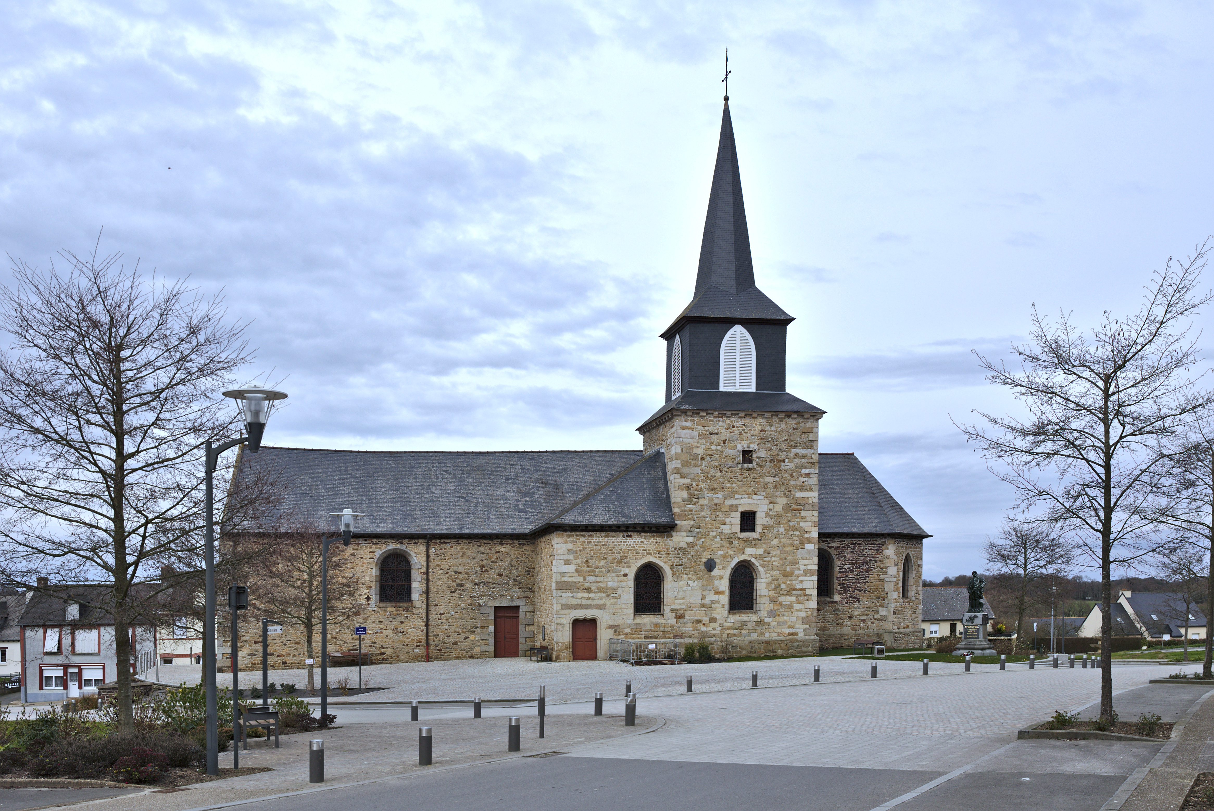 Iliz Tremorae.